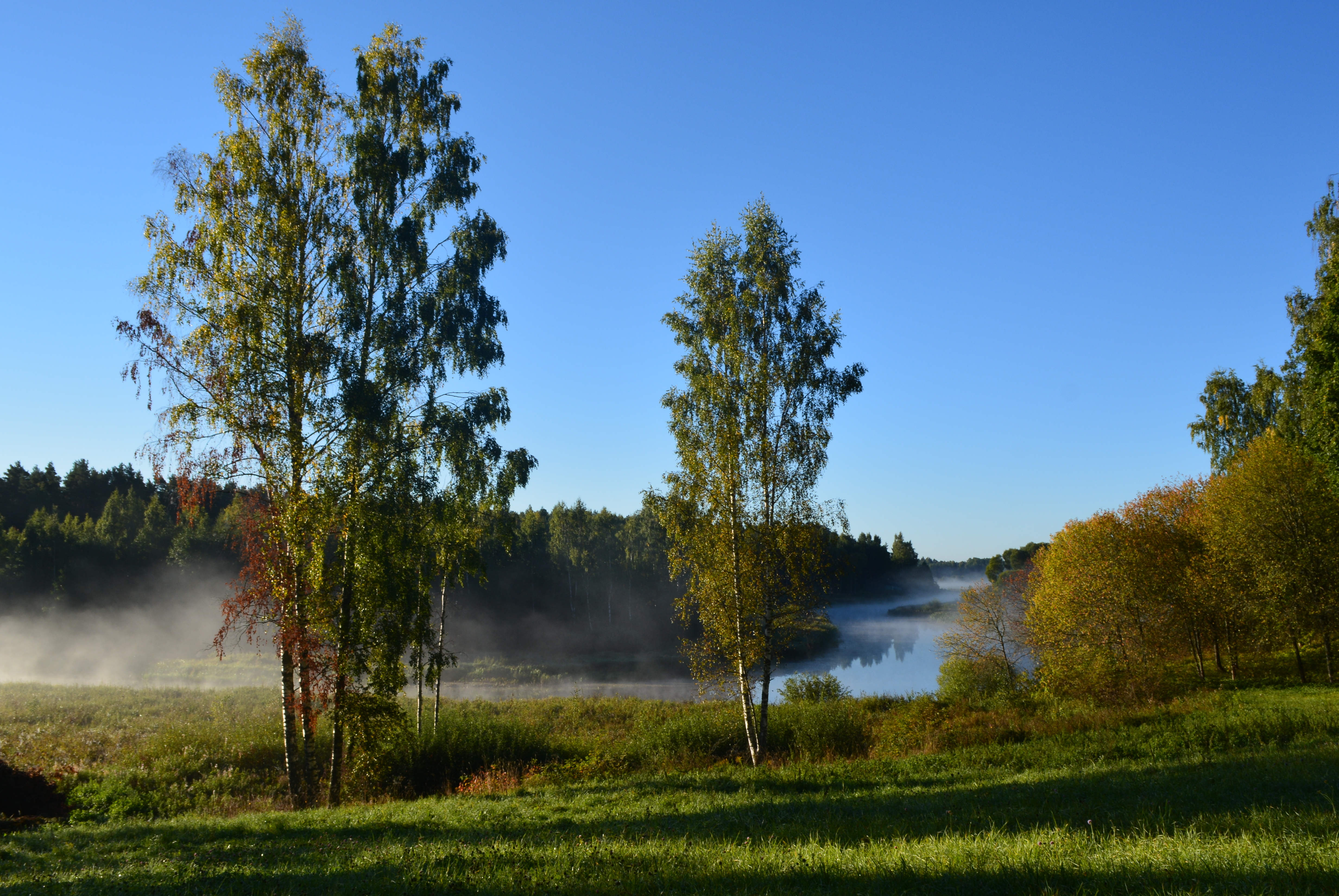 Lääniste linnamägi